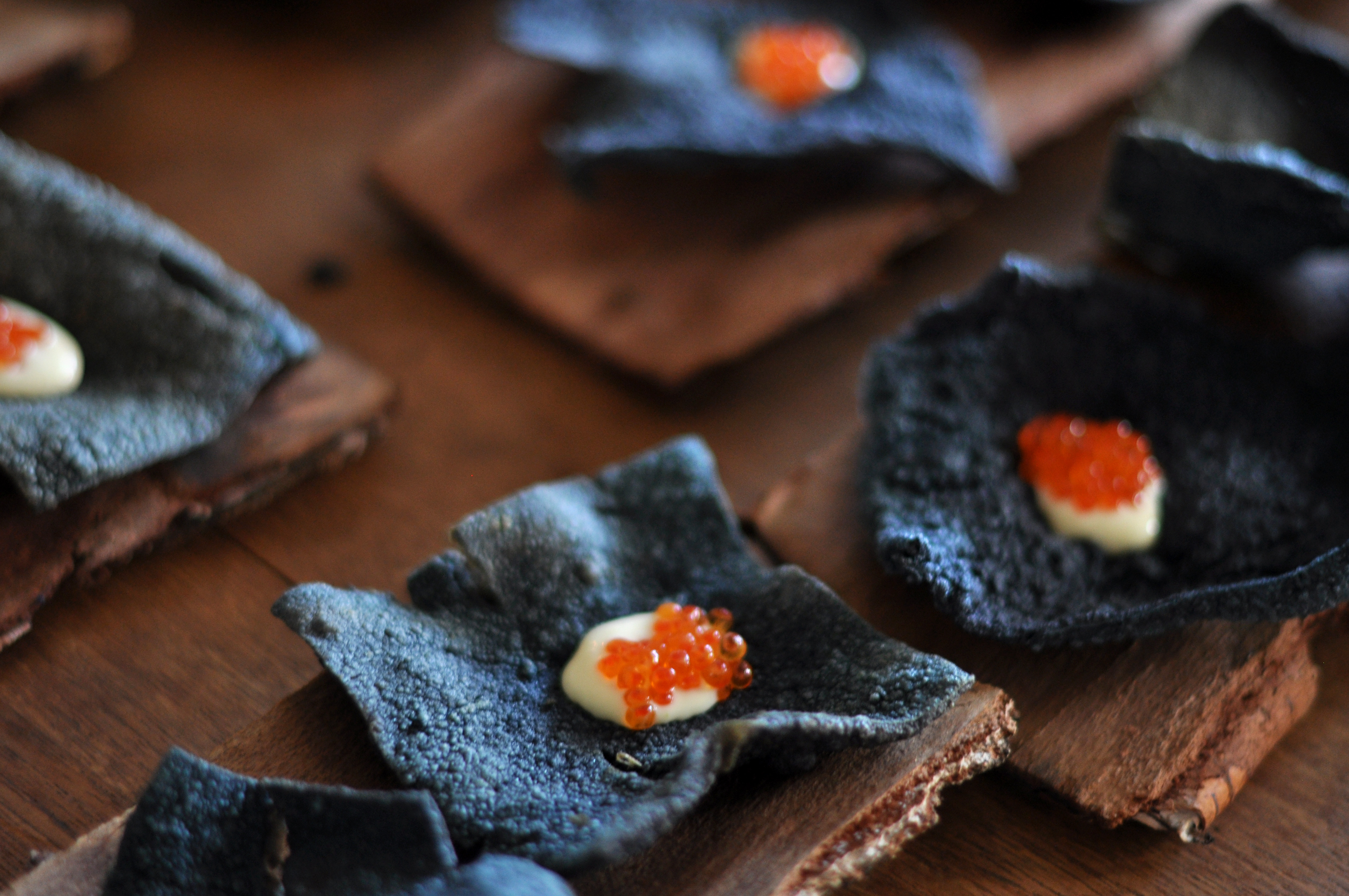 Rischips med limemayonnaise og ørredrogn